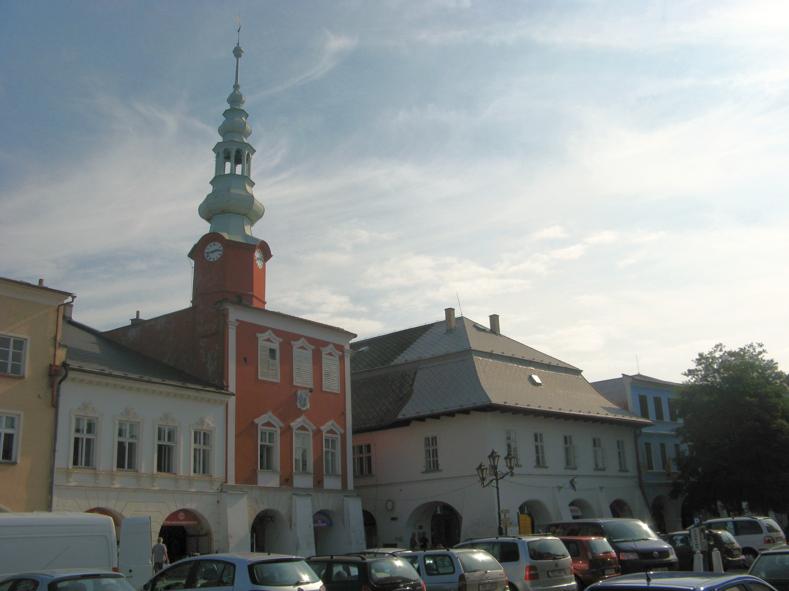 Dům U mouřenína (velký bílý dům) a Stará radnice (dům s věží) na Náměstí míru ve Svitavách